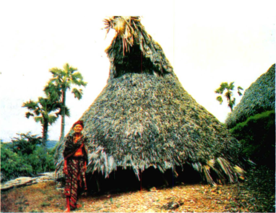 Berikut ini adalah rumah adat suku Sabu di Nusa Tenggara Timur.